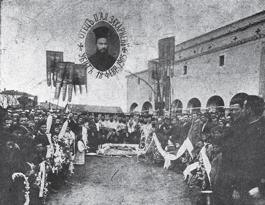 Погребението на свещеник Александър Захариев в 1905 година.